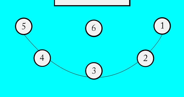 Lo schema della numerazione di pallanuoto.